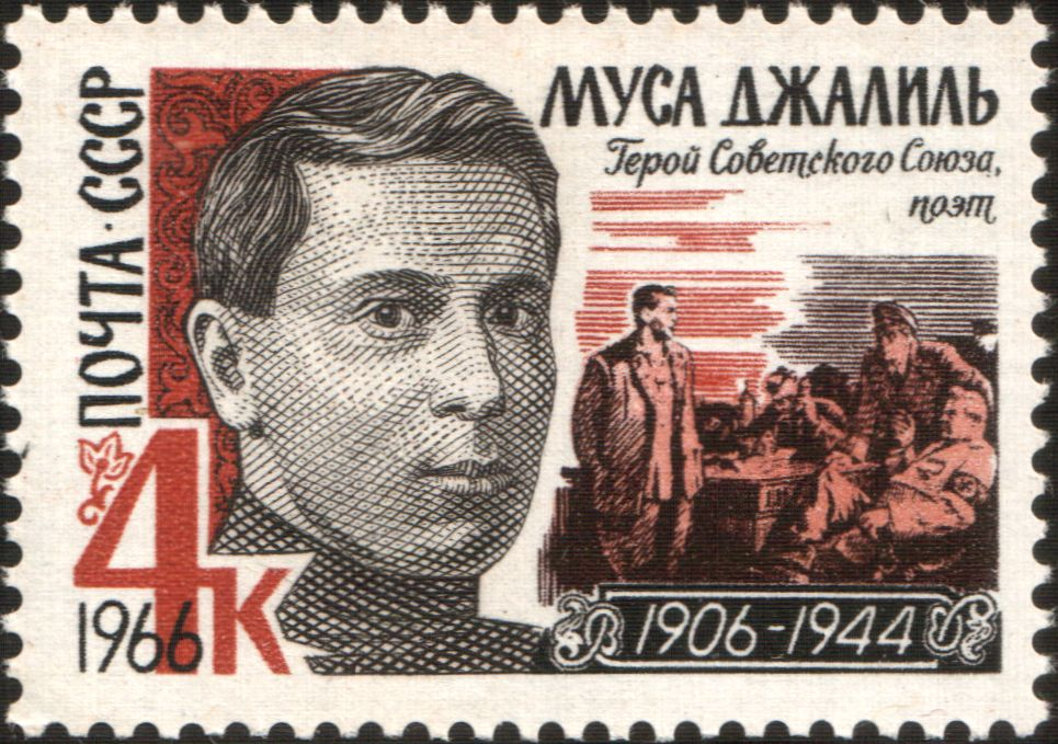 Почтовая марка СССР - Муса Джалиль